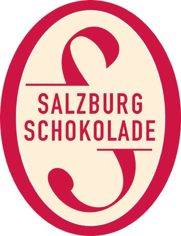 Logo von Salzburg Schokolade